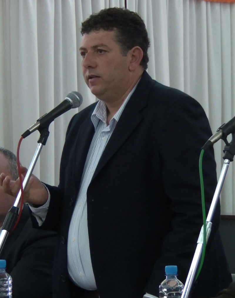 Ignazio Cutrò. Ribera Social Forum. Convegno "Racket e Antiracket". Aula Consiliare "L.Frenna" Ribera(Ag)